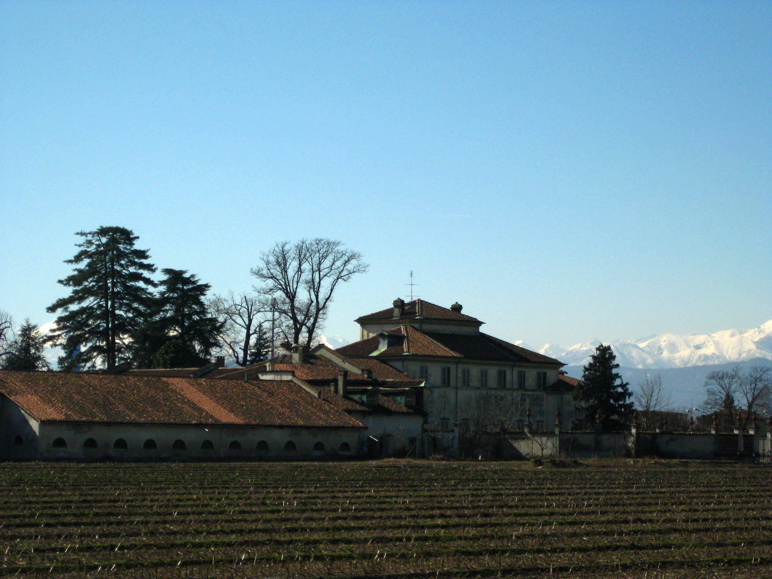 Interlingua: I campi del Gerbido e la cascina Palazzo